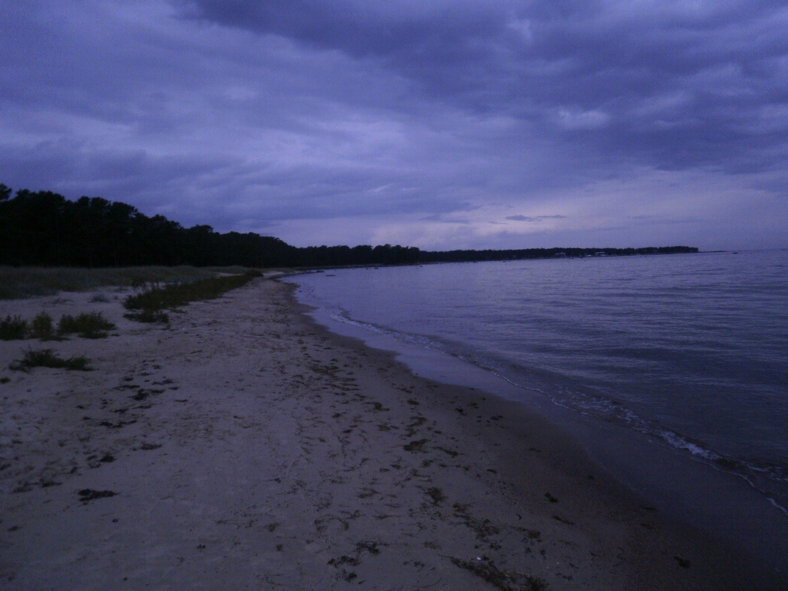 Lohusalu rand.